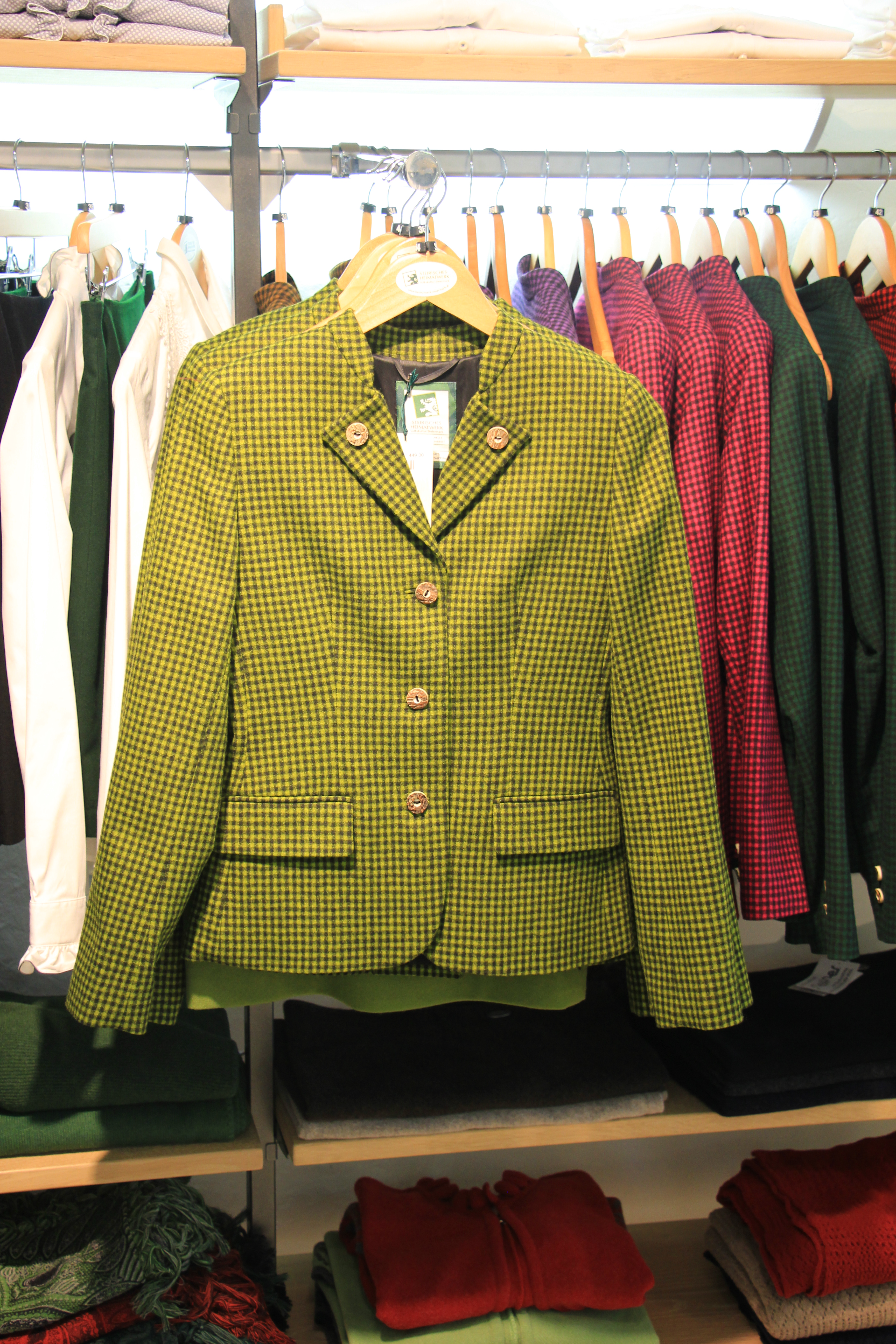 Besuch im Steirischen Heimatwerk im Zuge der Sommeruni Graz-Wien-Salzburg - Rosegger-Janker in verschiedenen Farben